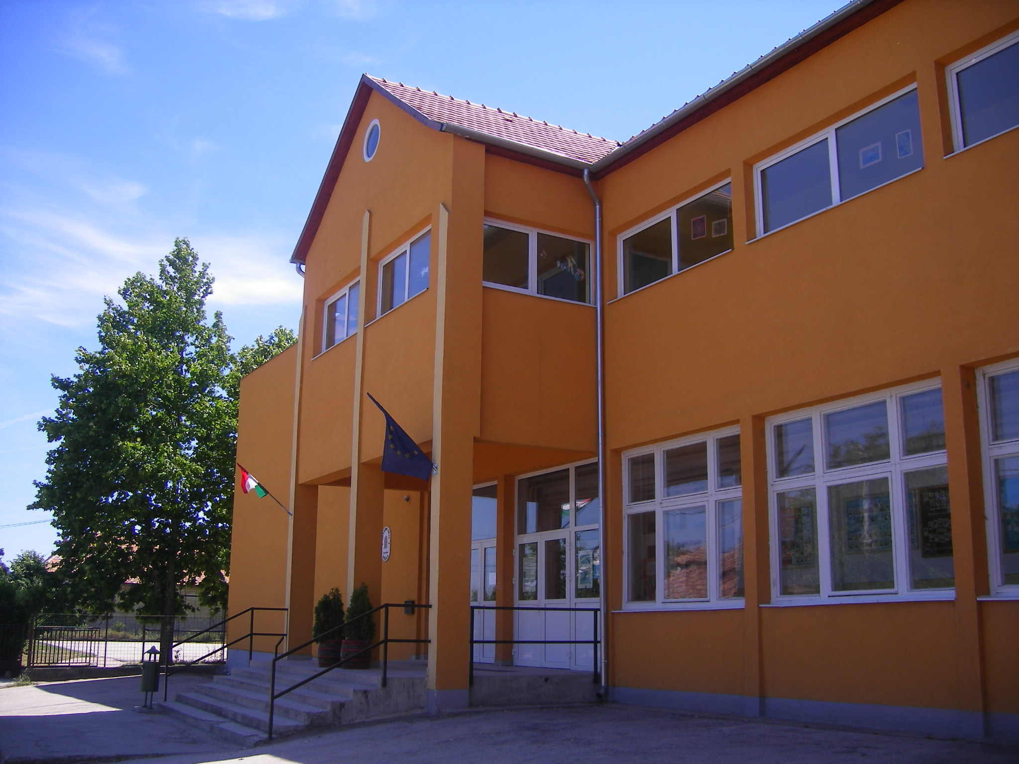 Ácsi Gárdonyi Géza általános iskola, (Fő utca 88) Igmándi utca felől [1] egyébb telephely: Ács, Ifjúság utca 1